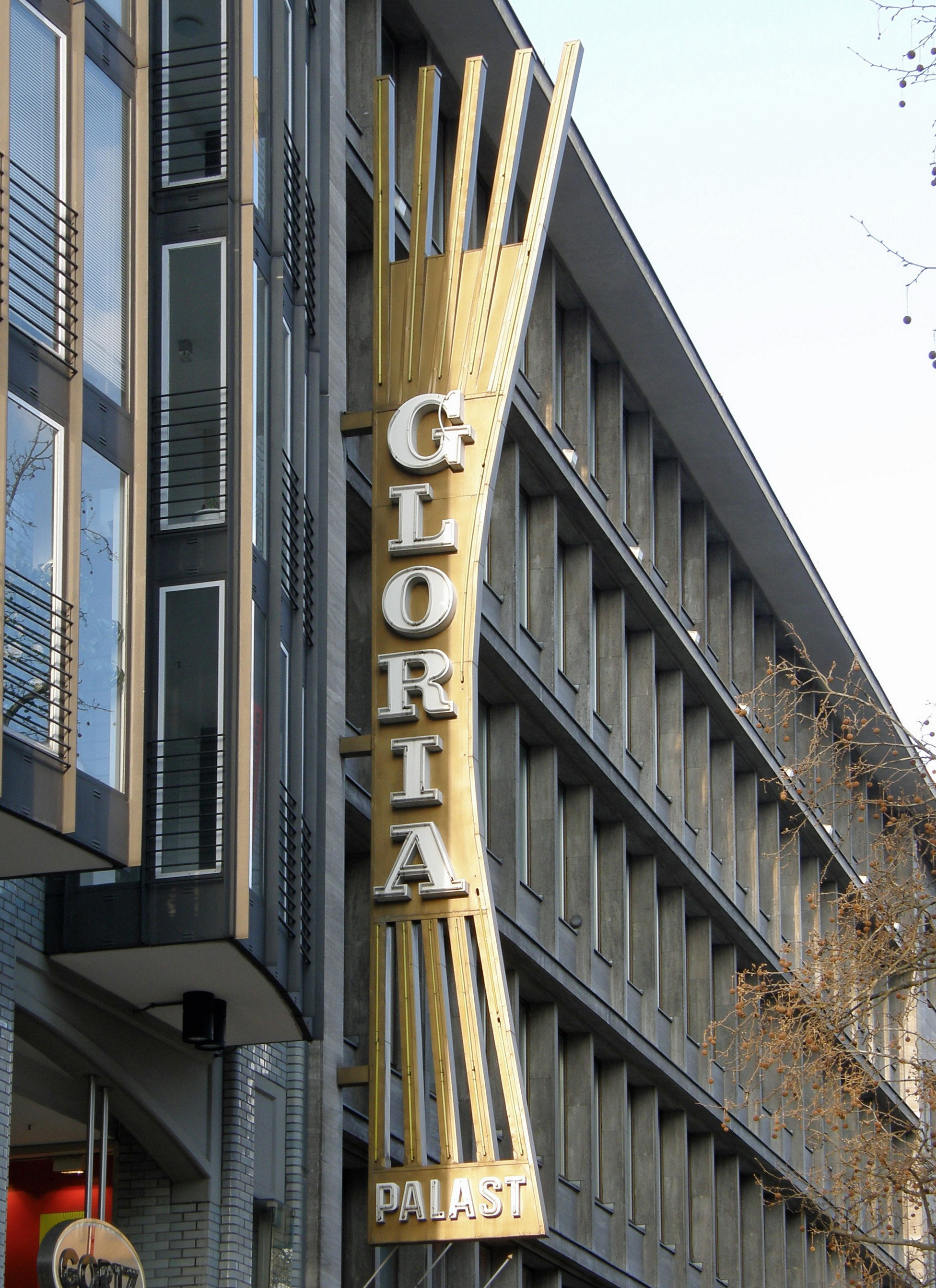 Kino Gloria-Palast am Kurfürstendamm in Berlin